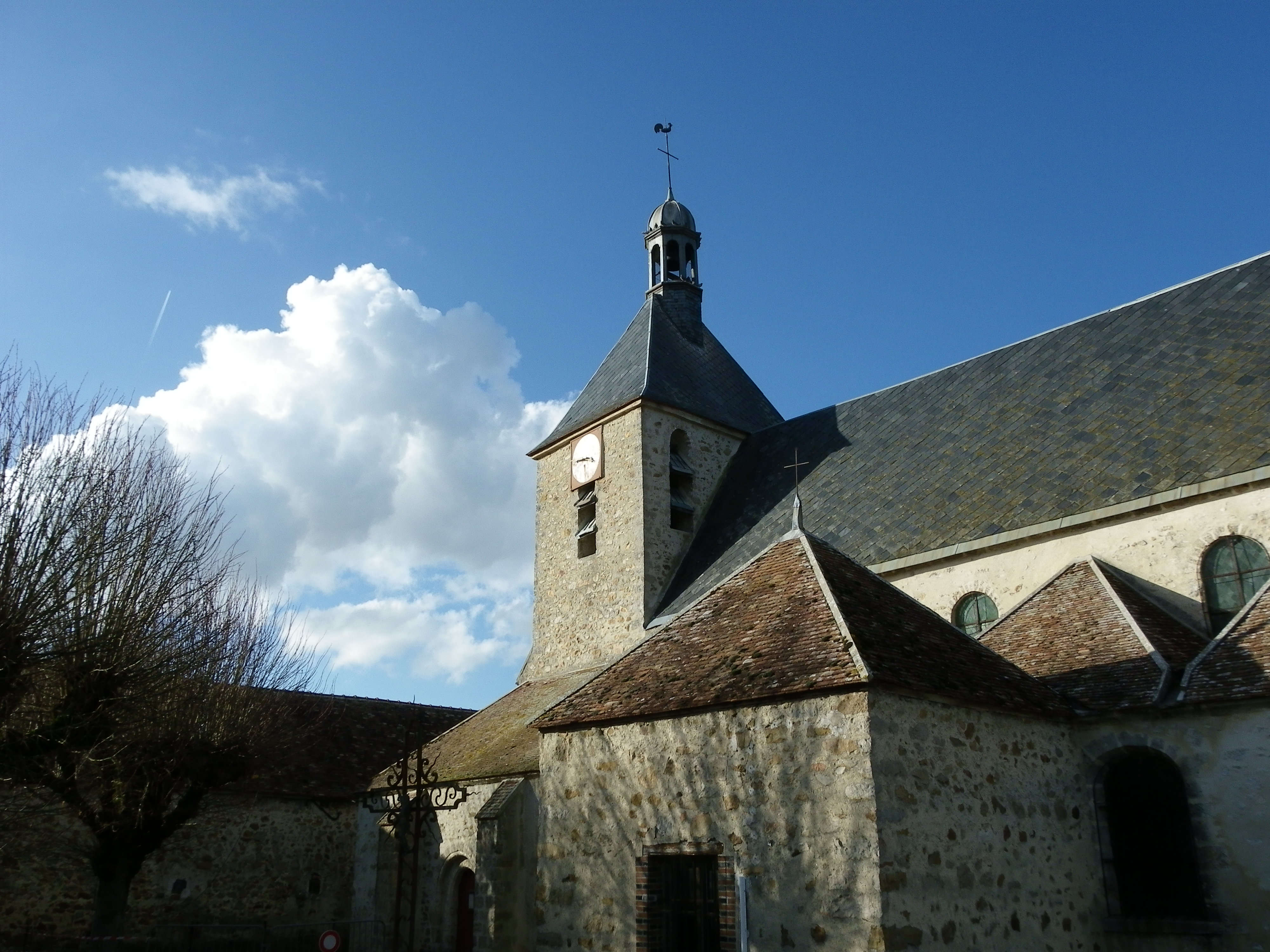 L'église à Marnay sur Seine ( Aube )